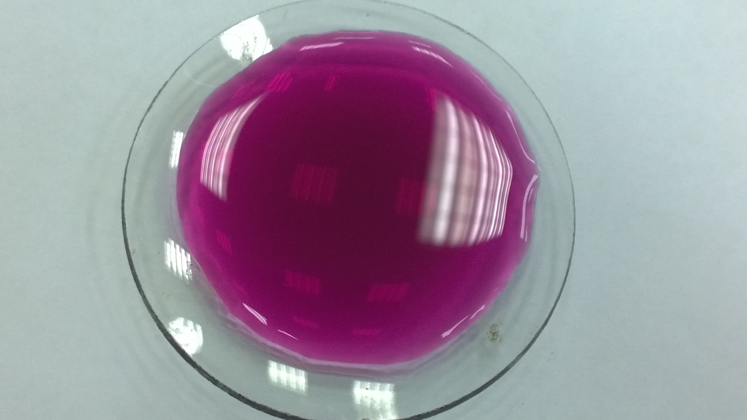 Марганцовая кислота на часовом стекле